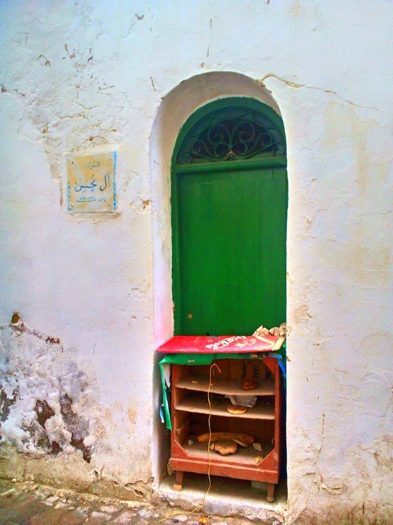 La médina de Tunis مدينة تونس العتيقة